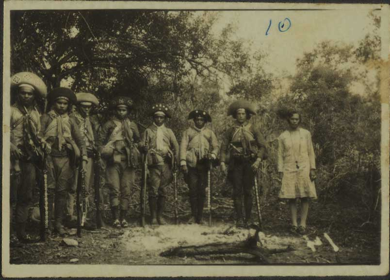 Cangaceiros